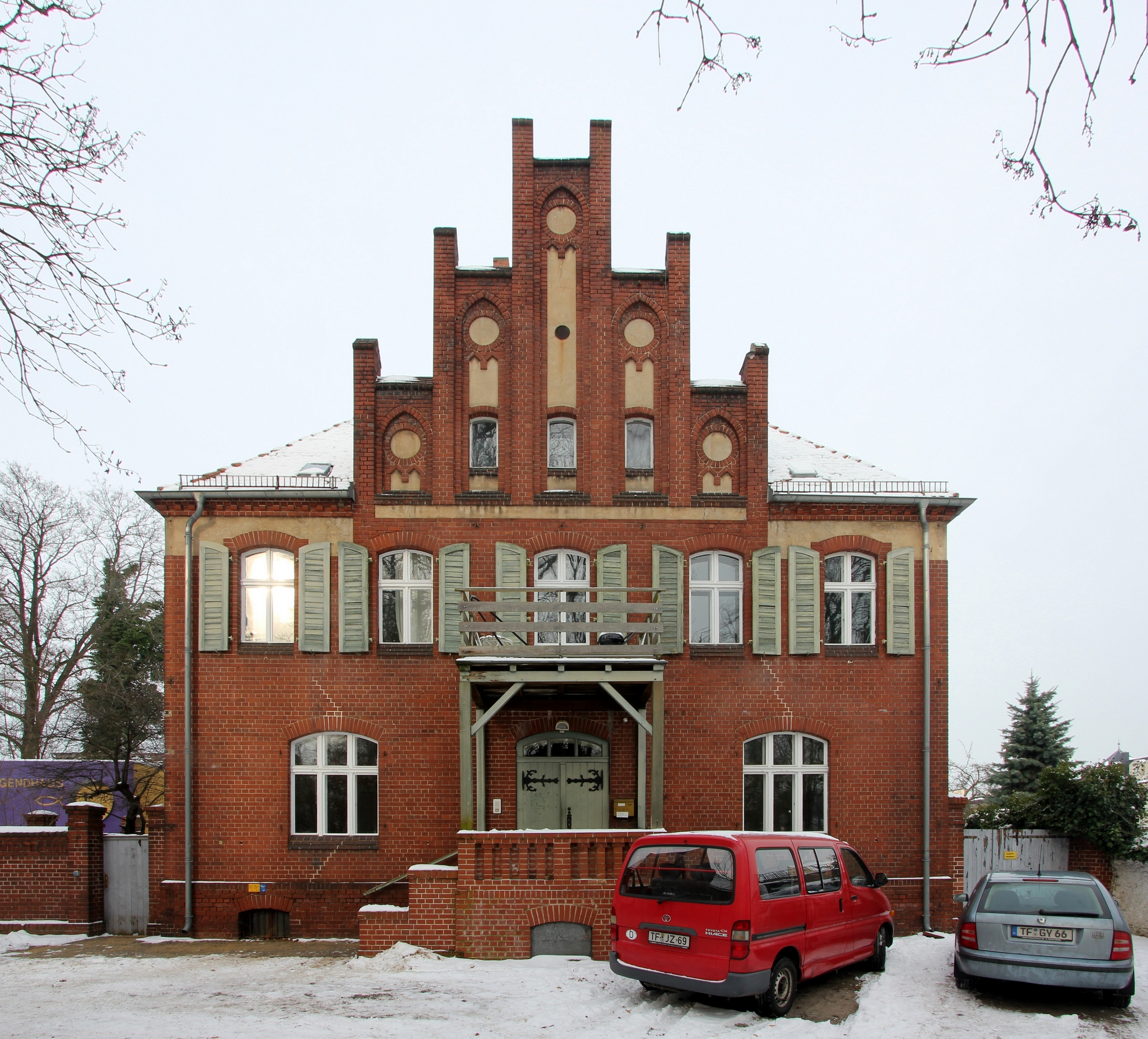 Luckenwalde in Brandenburg: Das Pfarrhaus der Jakobikirche. Das Gebäude ist ein eingetragenes Baudenkmal.